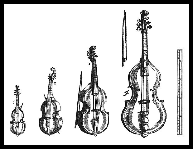 Família de instrumentos viola da gamba, em vários tamanho, Michael Praetorius em Syntagma musicum,1618.